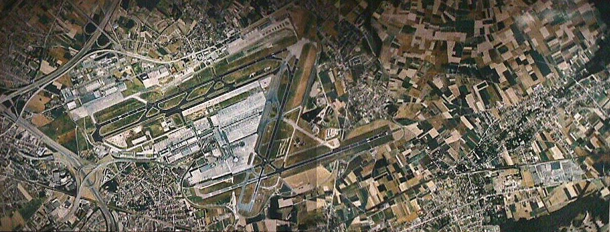 eigen fotosamenstelling Ben Pirard